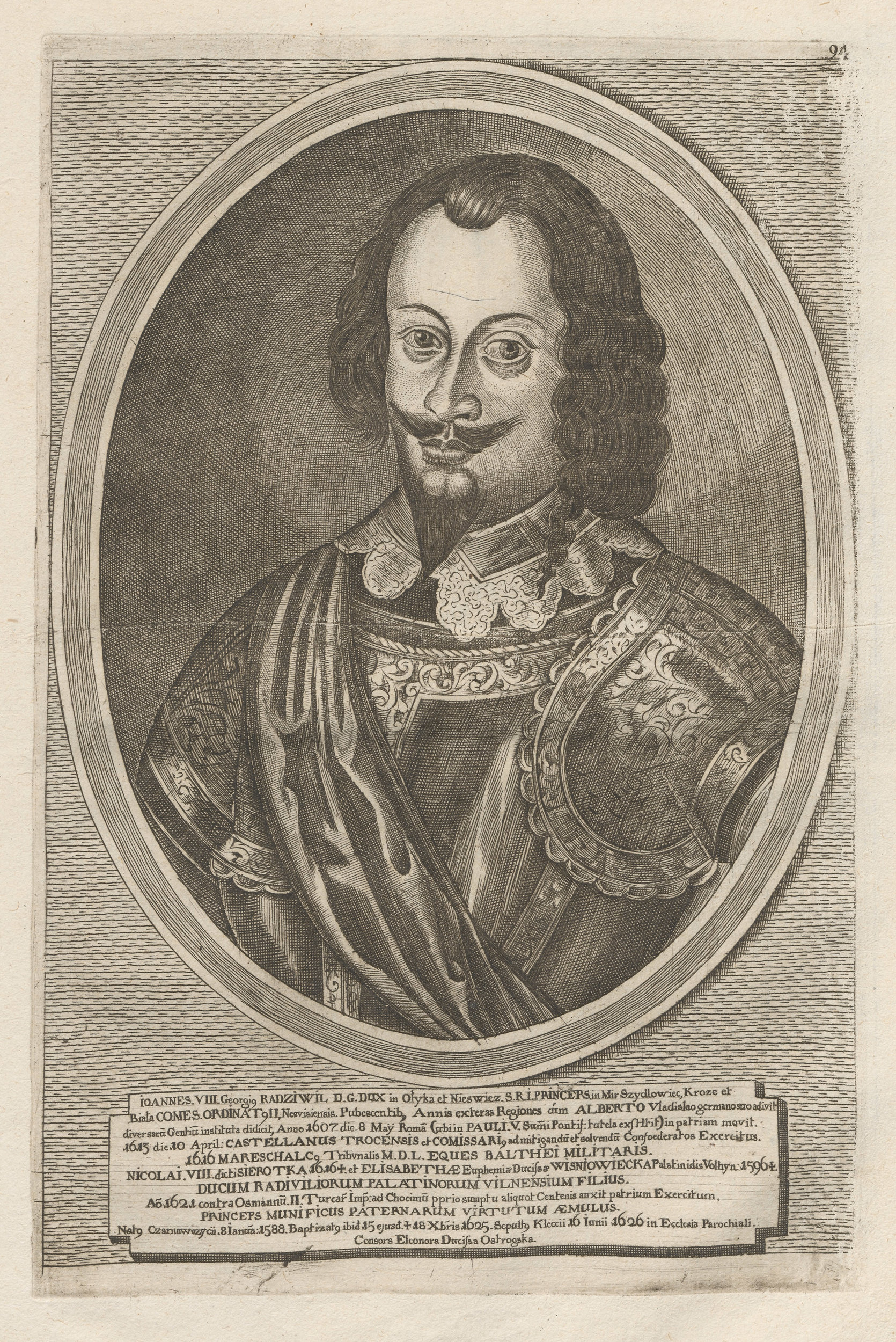 Беларуская (тарашкевіца): Партрэт Яна Юрыя Радзівіла (Jan Jury Radzivił)